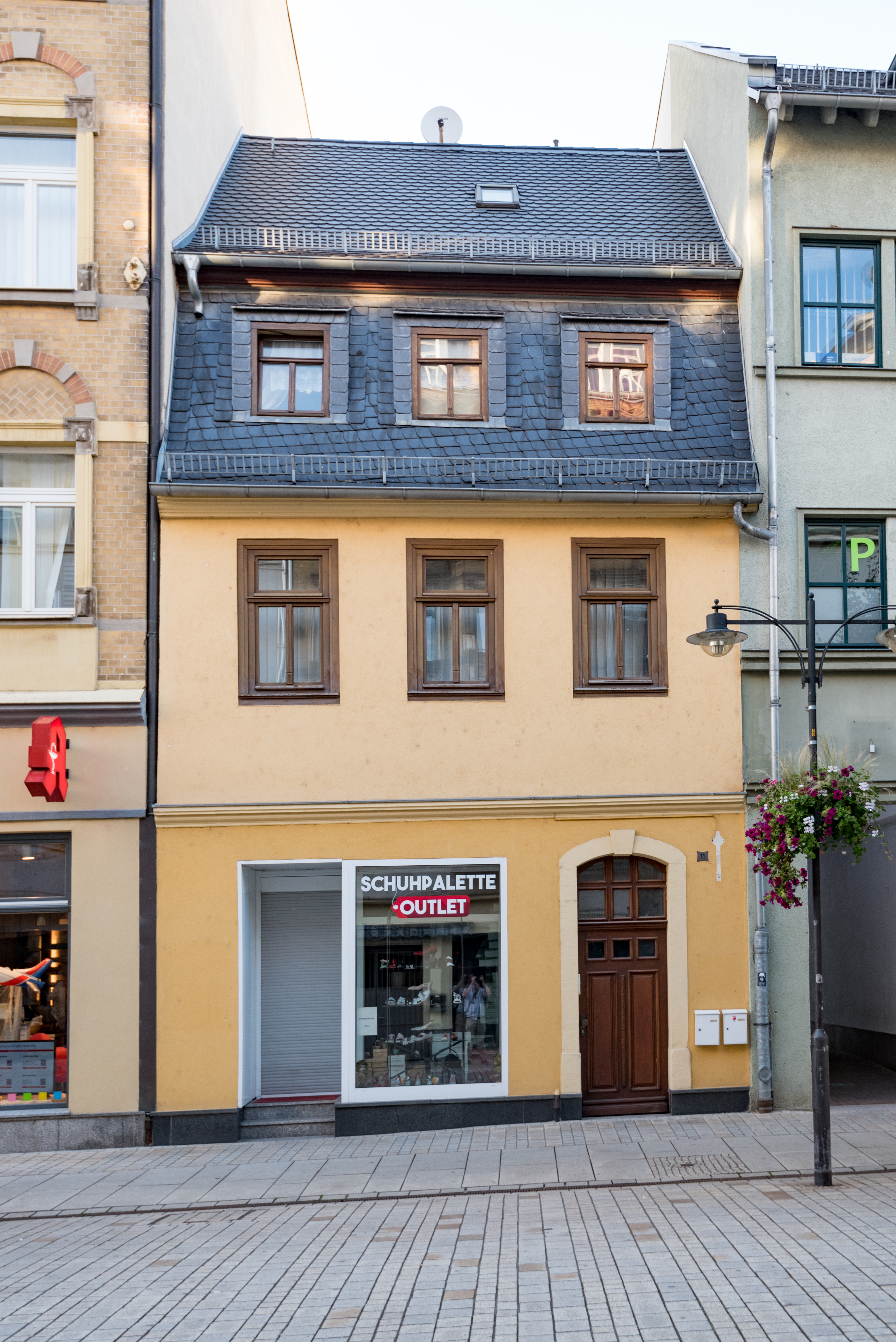 Weißenfels, Jüdenstraße 11